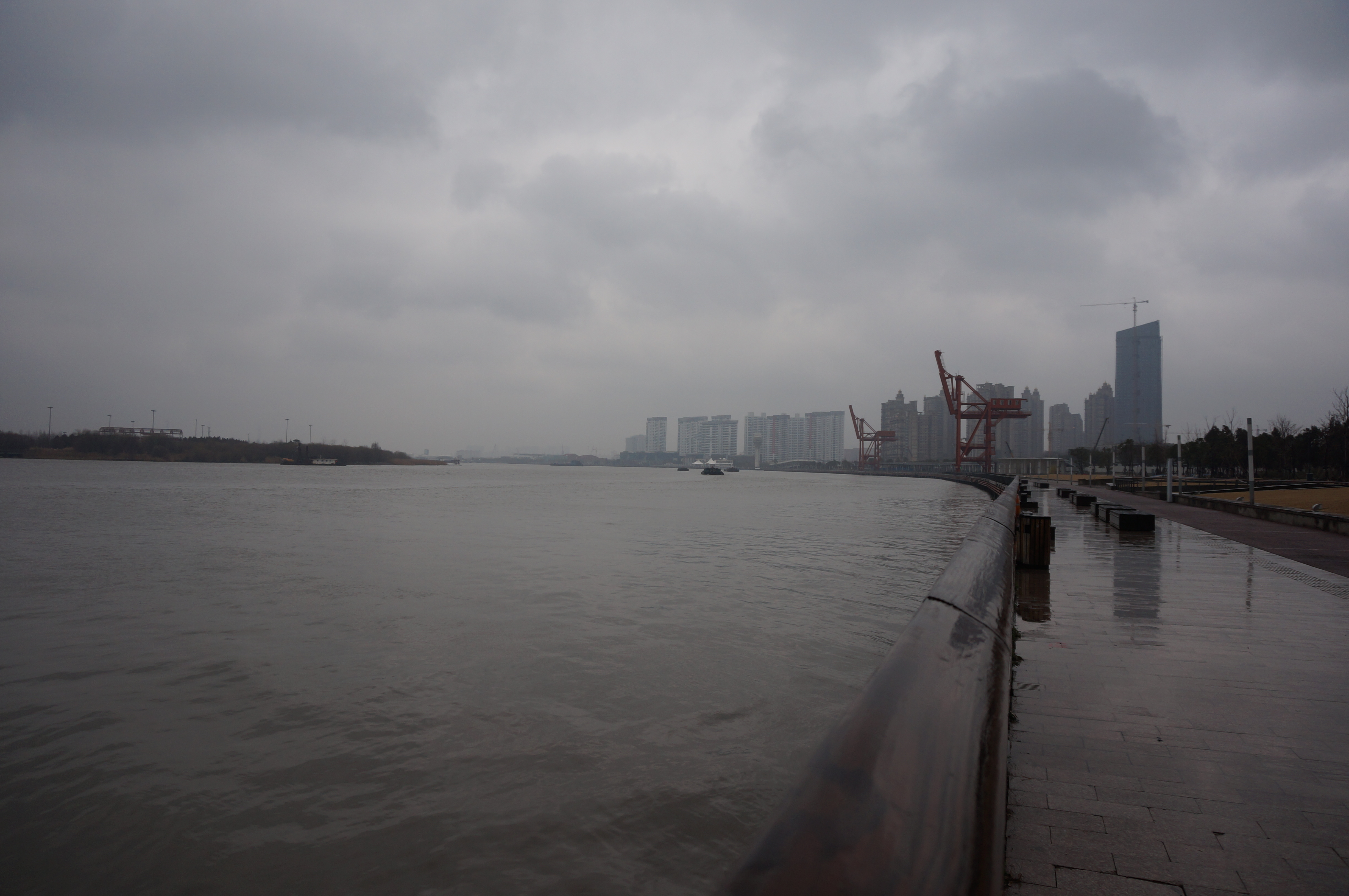 中文（中国大陆）: 位于原卢湾区的滨江绿地